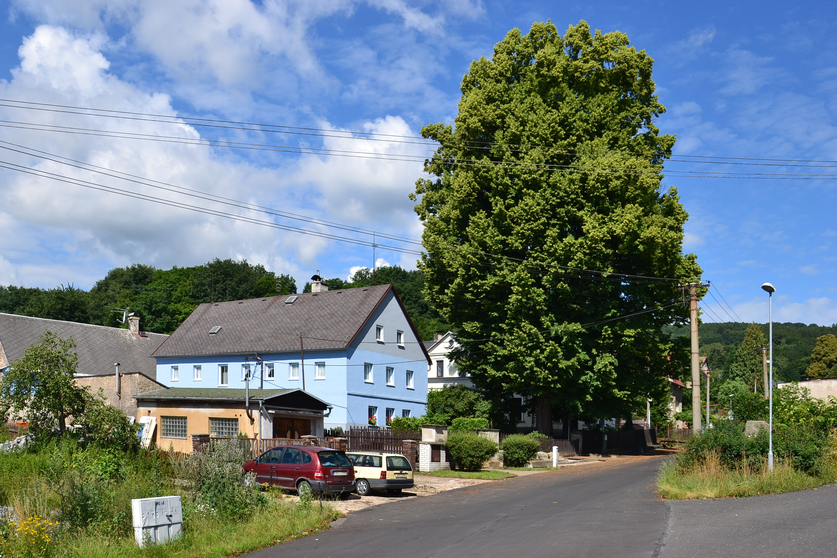 Památné lípy v Křižatecké ulici